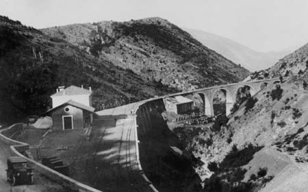 Sicht der Station und den Viadukt während den Gleisbauarbeiten